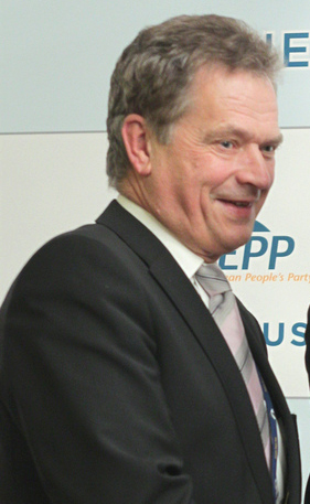 Niinisto